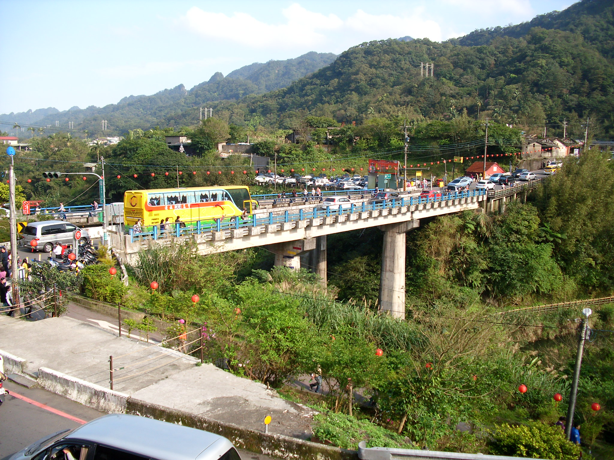 Bân-lâm-gú: 佇臺灣新北市平溪區菁桐的平菁橋。